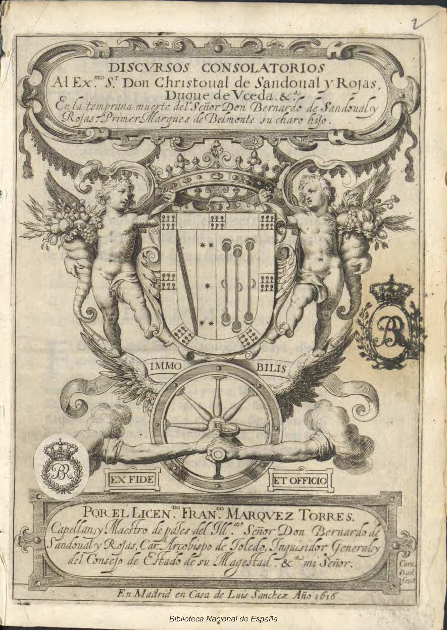 Portada calcográfica de "Discursos consolatorios al Exmo. Sr. Don Christoual de Sandoual y Rojas, Duque de Uceda &c. En la temprana muerte del Señor Don Bernardo de Sandoual y Rojas, Primer Marqués de Belmonte su charo hijo... Por el licenciado Franco. Marquez Torres", en Madrid, en casa de Luis Sánchez, 1616.